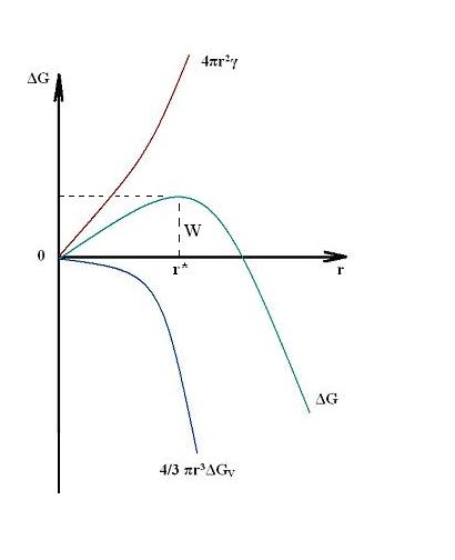 Składowe wykresu zmiany energii swobodnej powierzchniowej i objętościowej dla zarodkowania homogenicznego.